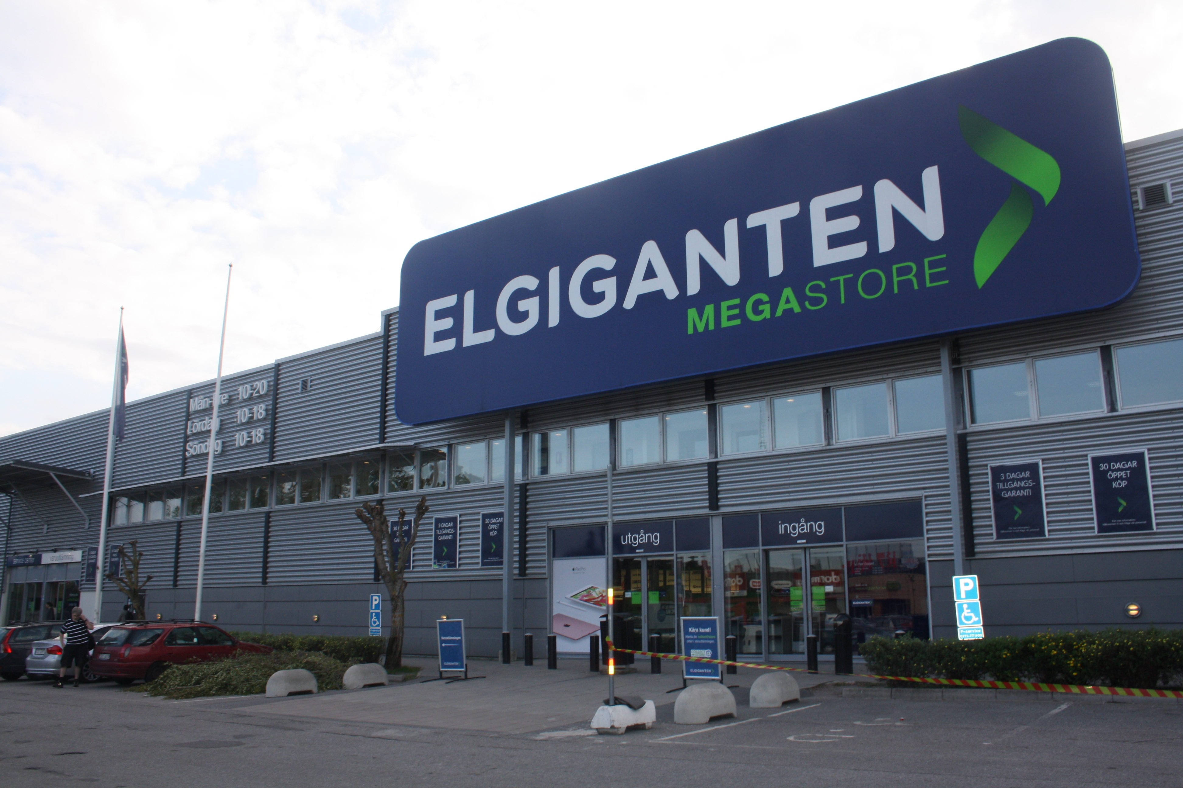 Elgiganten Kungens Kurva september 2016